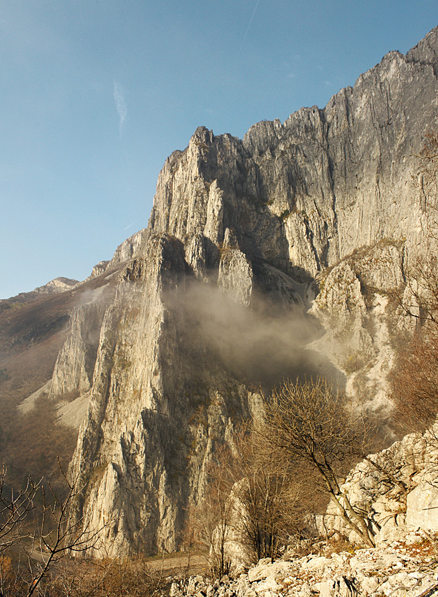 Вратцата